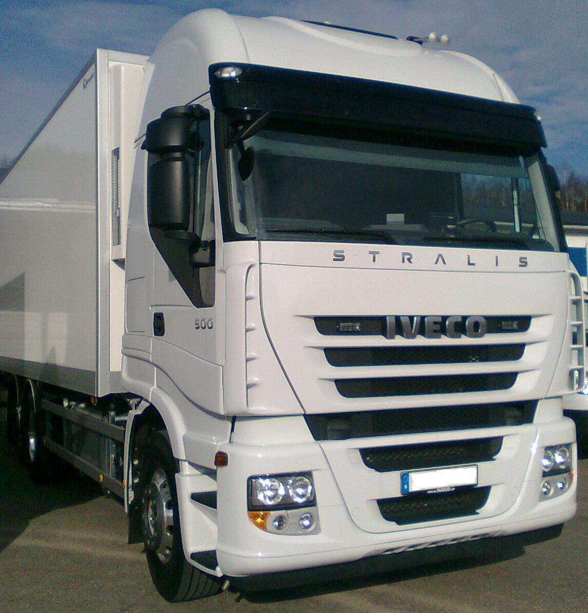 En av de förta IVECO STRALIS som är registrerade i sverige